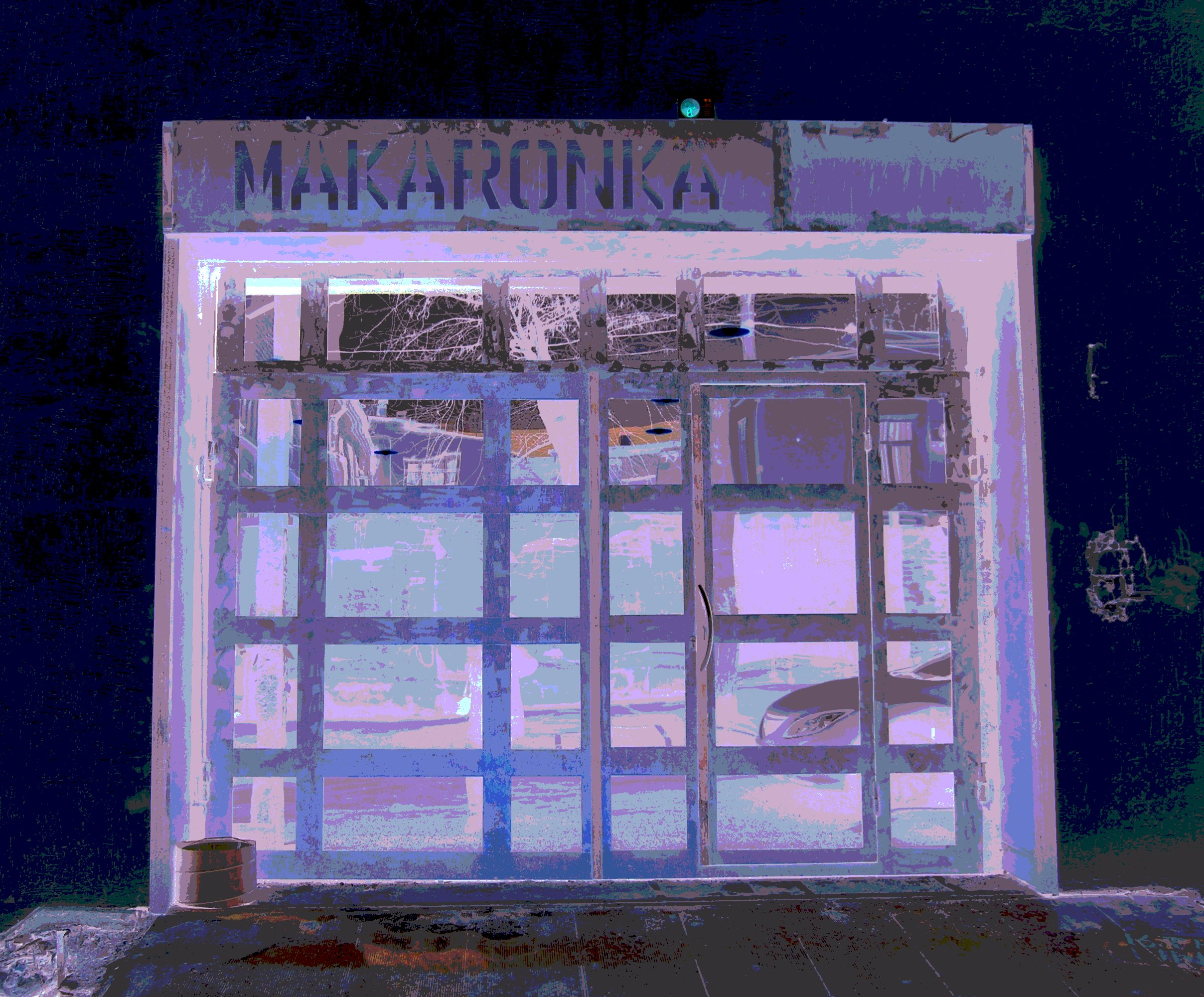 Арт-пространство MAKARONKA, Ростов-на-Дону, 18 линия 10. Февраль 2013